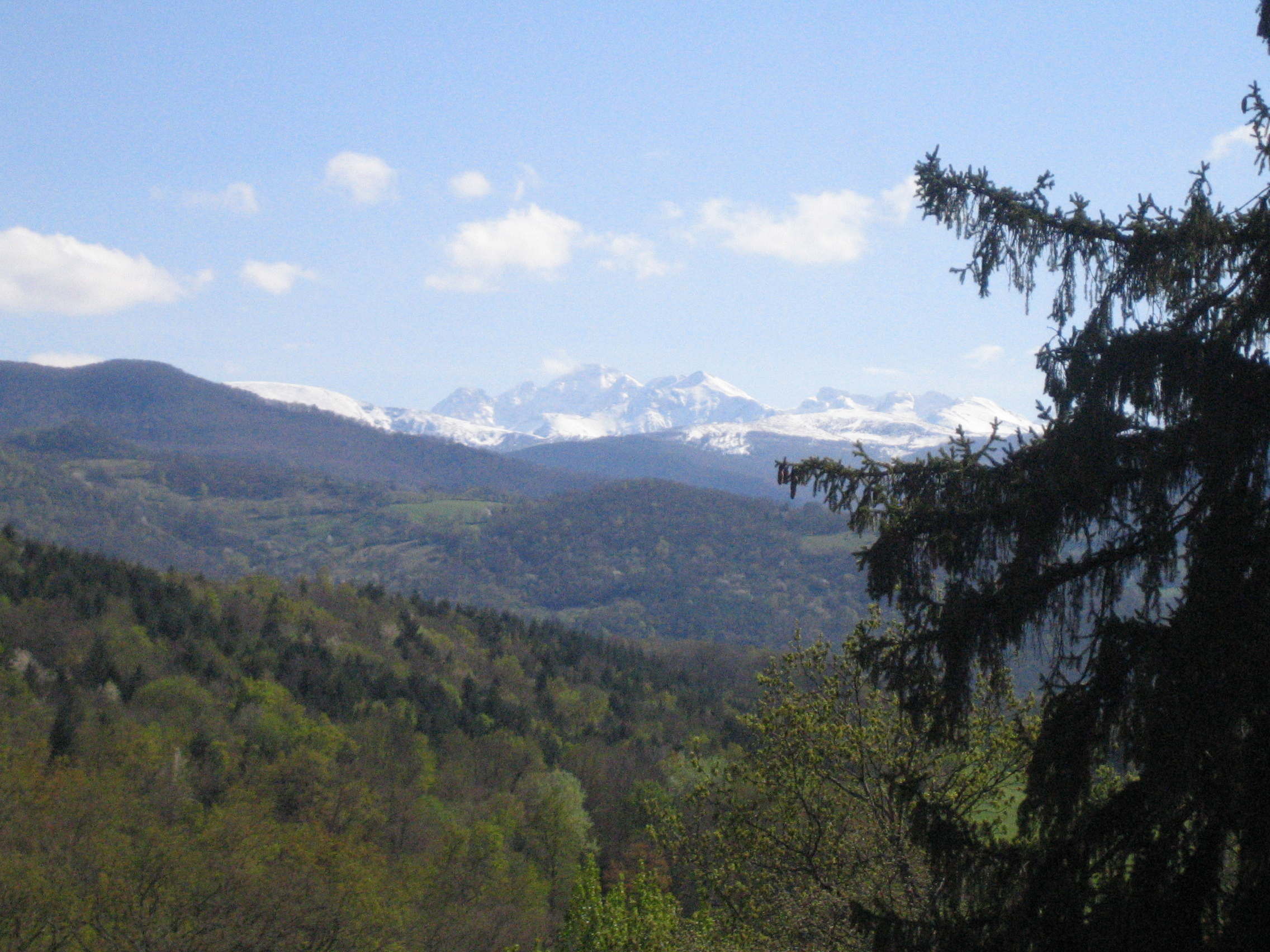 Le Mont Valier vu depuis Saint-Lizier d'Ustou (Ariège)